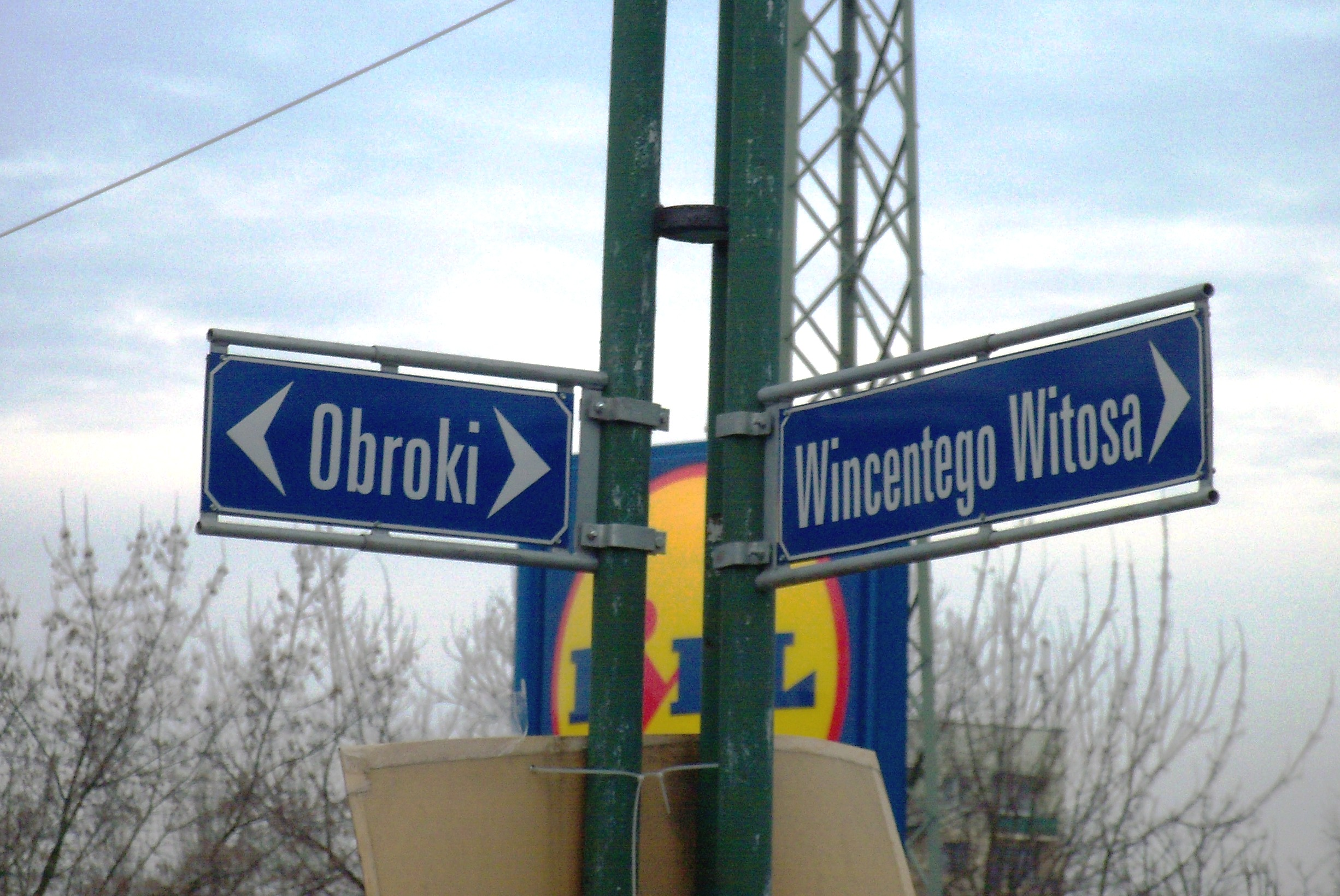 Znak przy skrzyżowaniu ul. Wincentego Witosa i ul. Obroki w Katowicach